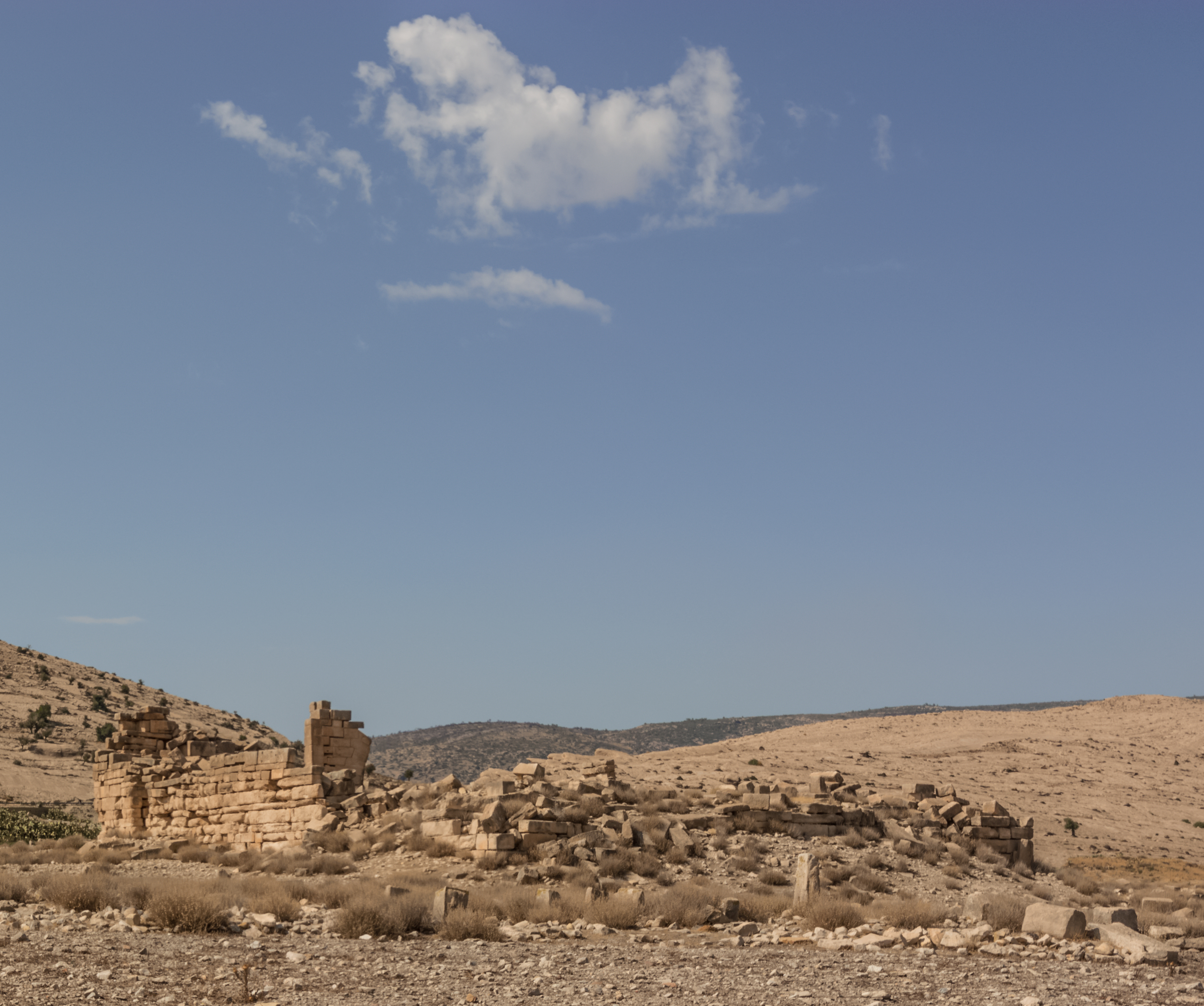 Citadelle byzantine